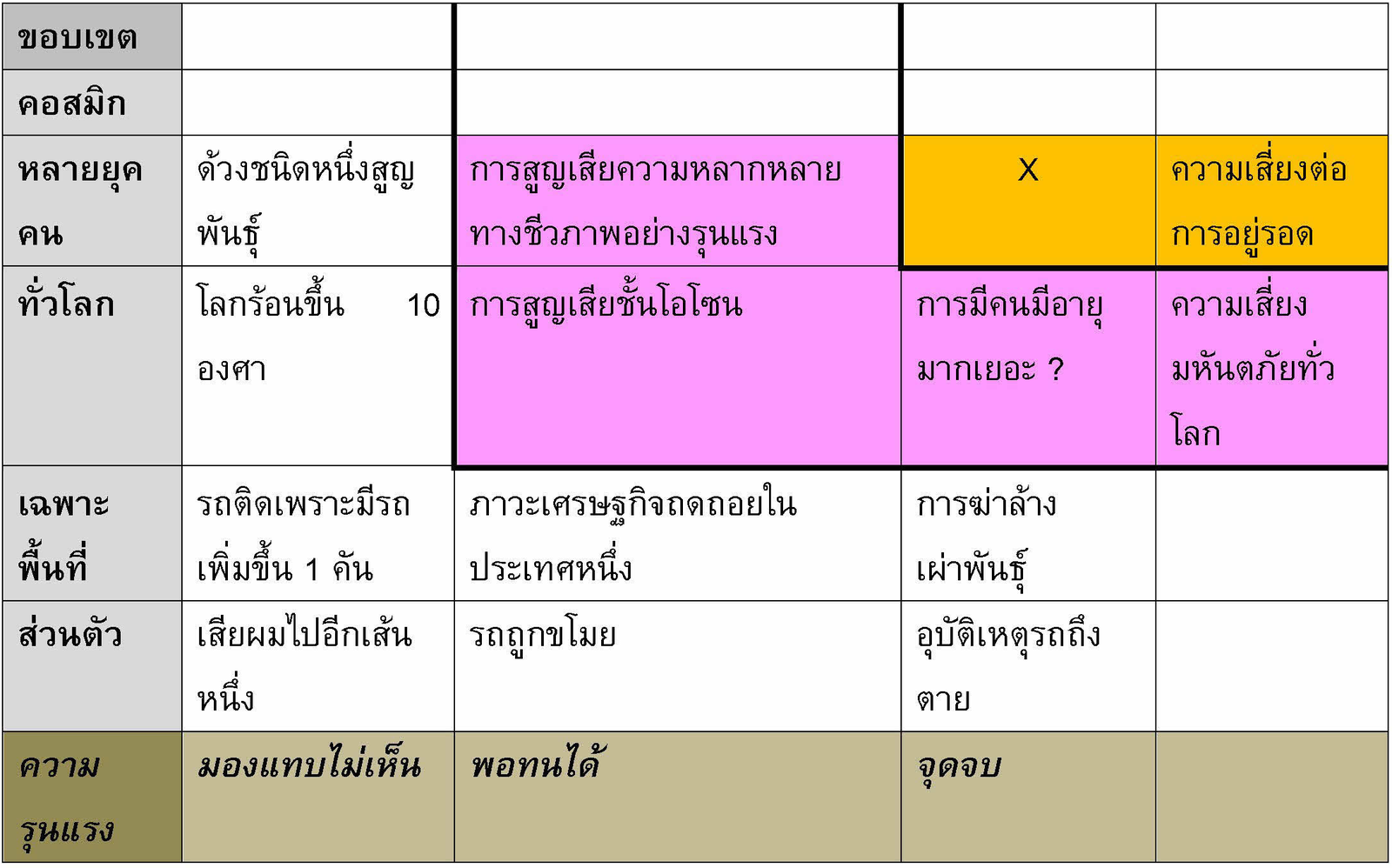 ตารางขอบเขต/ความรุนแรงของภัยต่าง ๆ ดัดแปลงจากบทความ "Existential Risk Prevention as Global Priority (การป้องกันความเสี่ยงต่อการอยู่รอด โดยเป็นเรื่องสำคัญของโลก)" ของ ดร. บอสตรอม